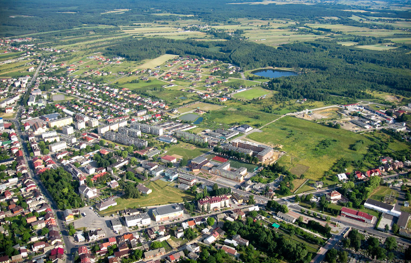 Pajęczno widok z lotu ptaka